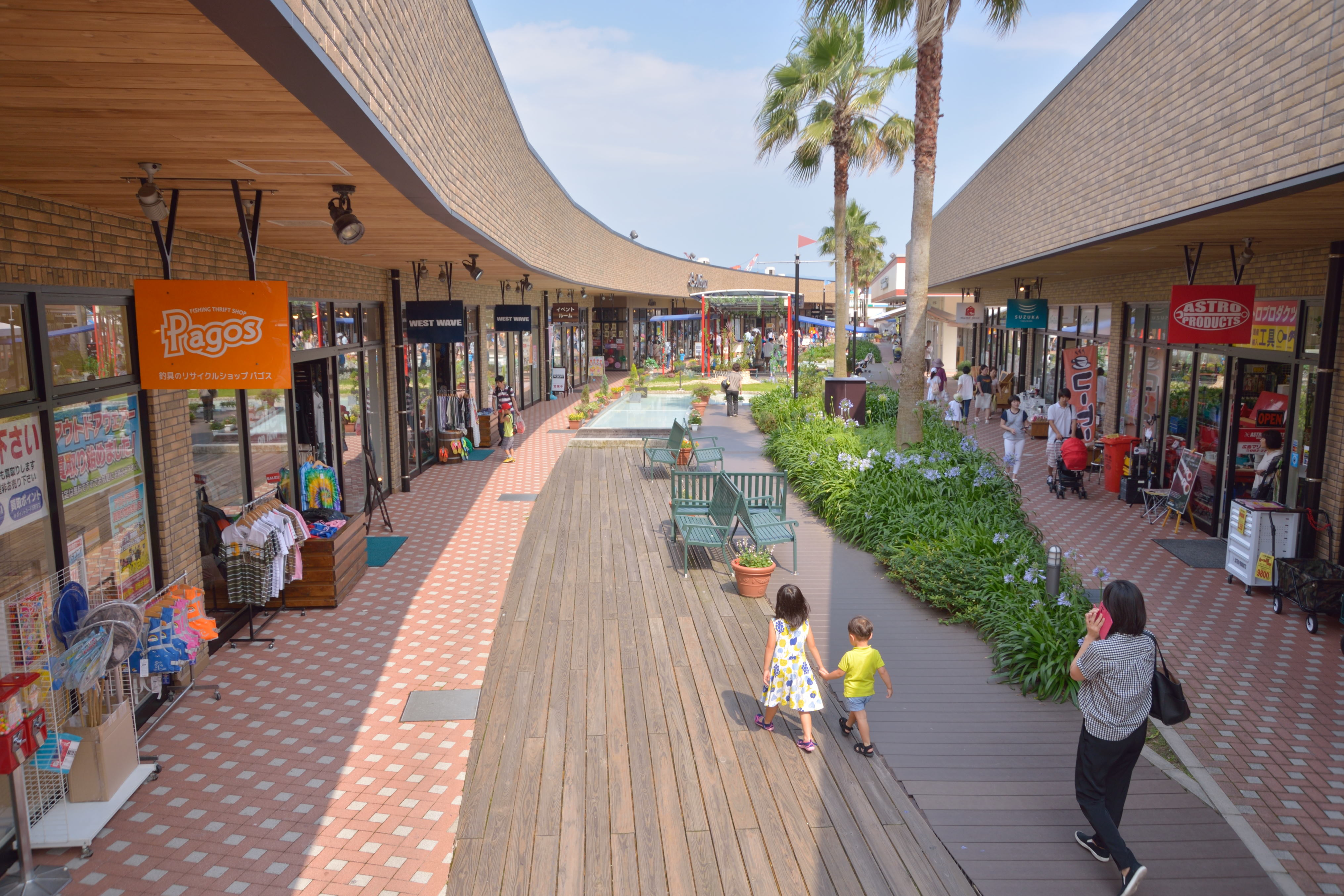 2016年壁面がレンガ調に改装。